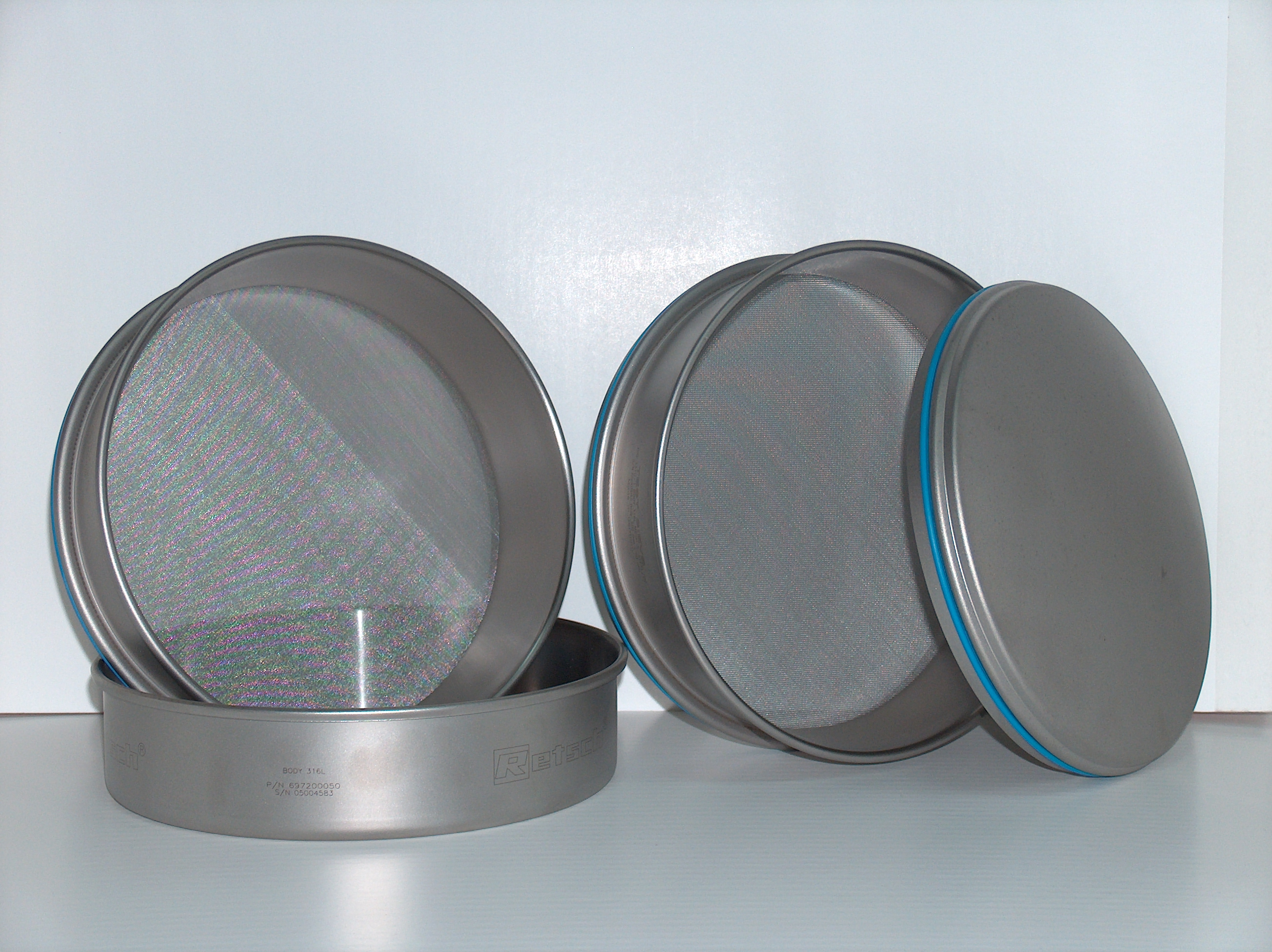 Tamises metálicos utilizados no fabrico de medicamentos manipulados